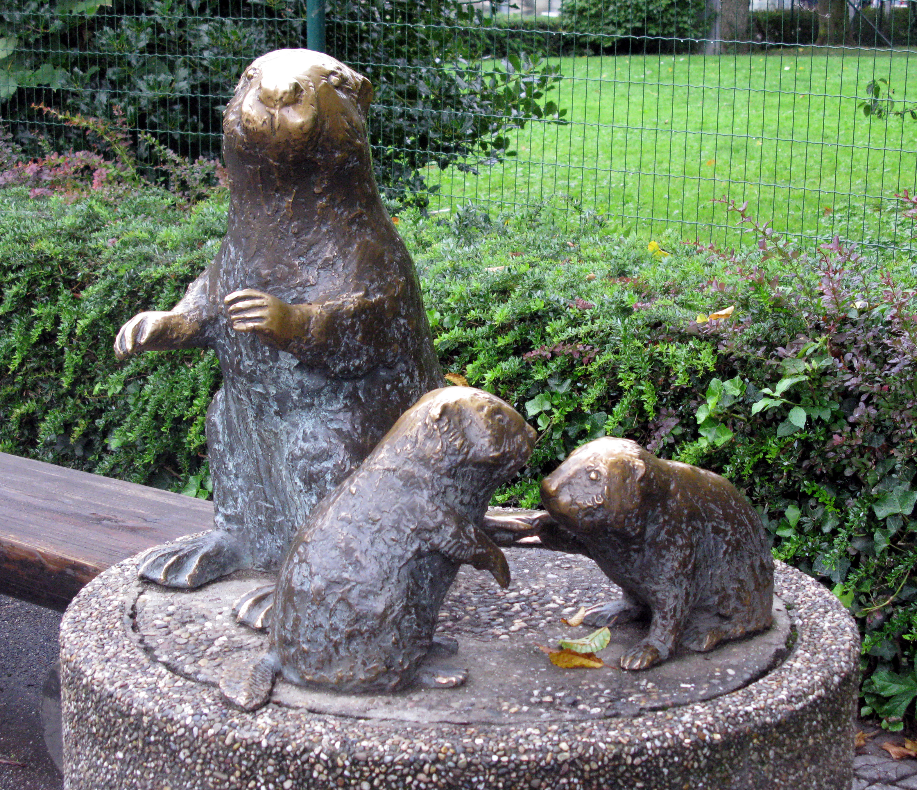 Zoo Karlsruhe, Biberskulptur